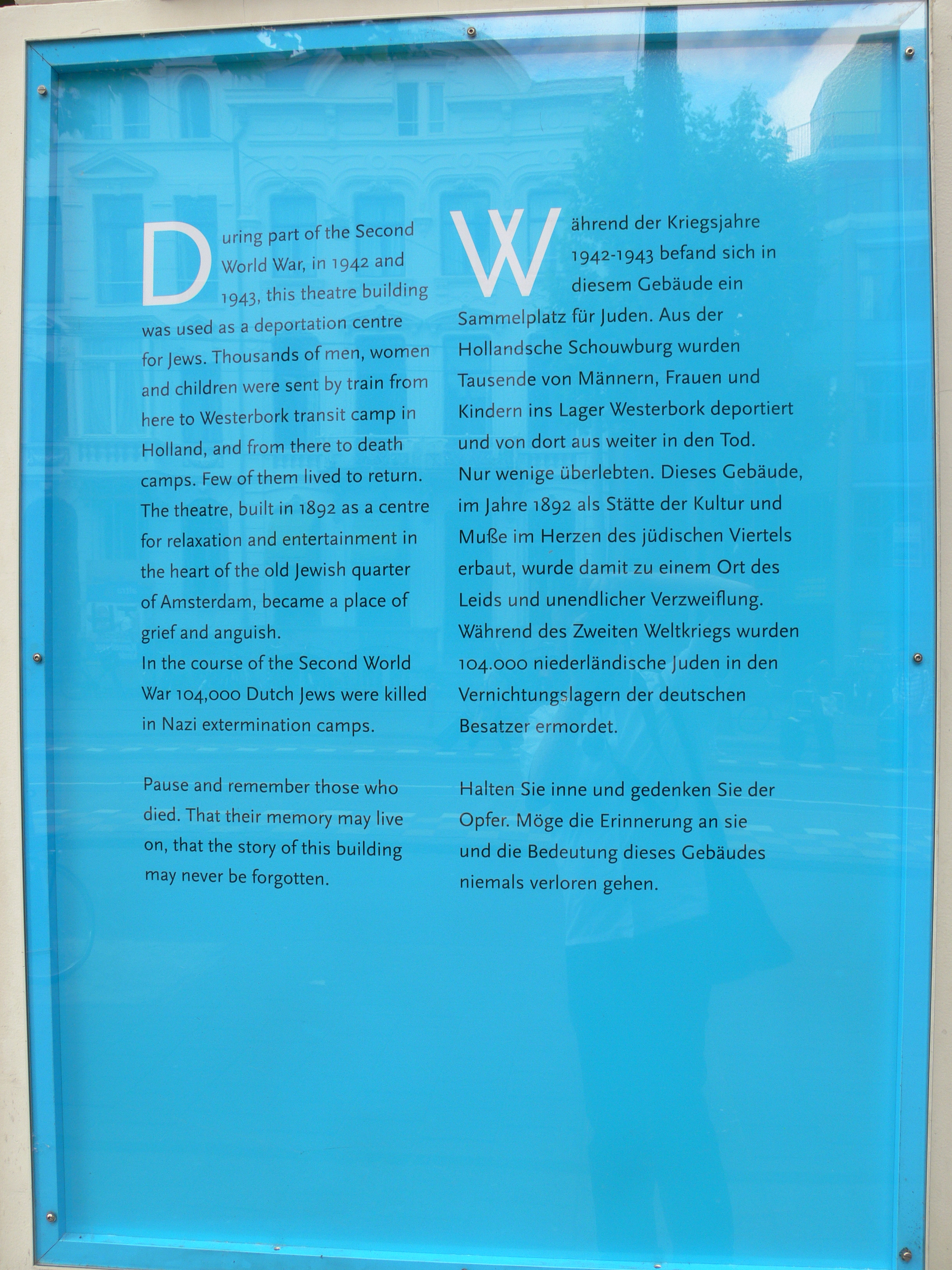 Hollandsche Schouwburg, Plantage Middenlaan, Amsterdam Infopanel